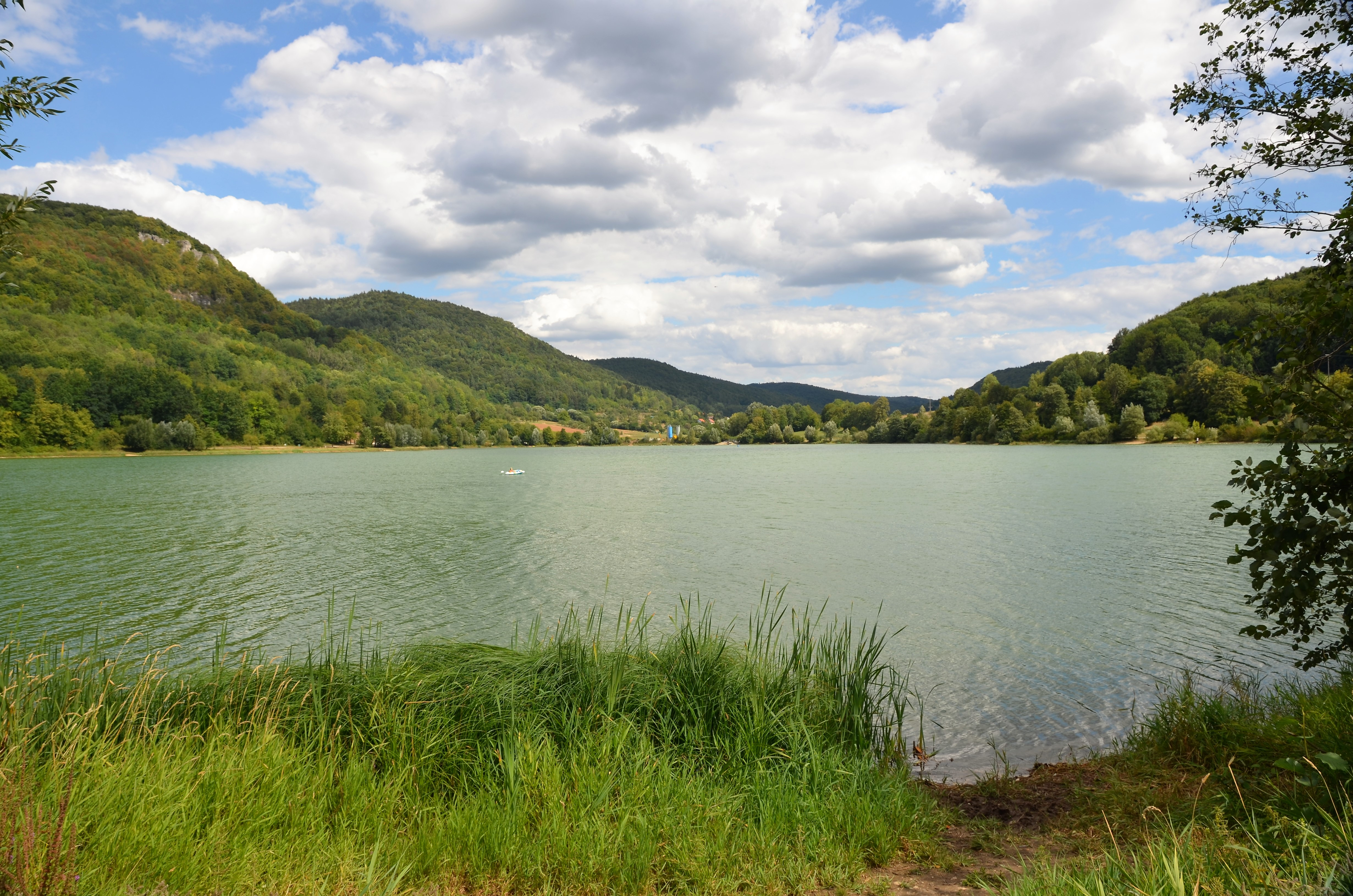 Happurger See